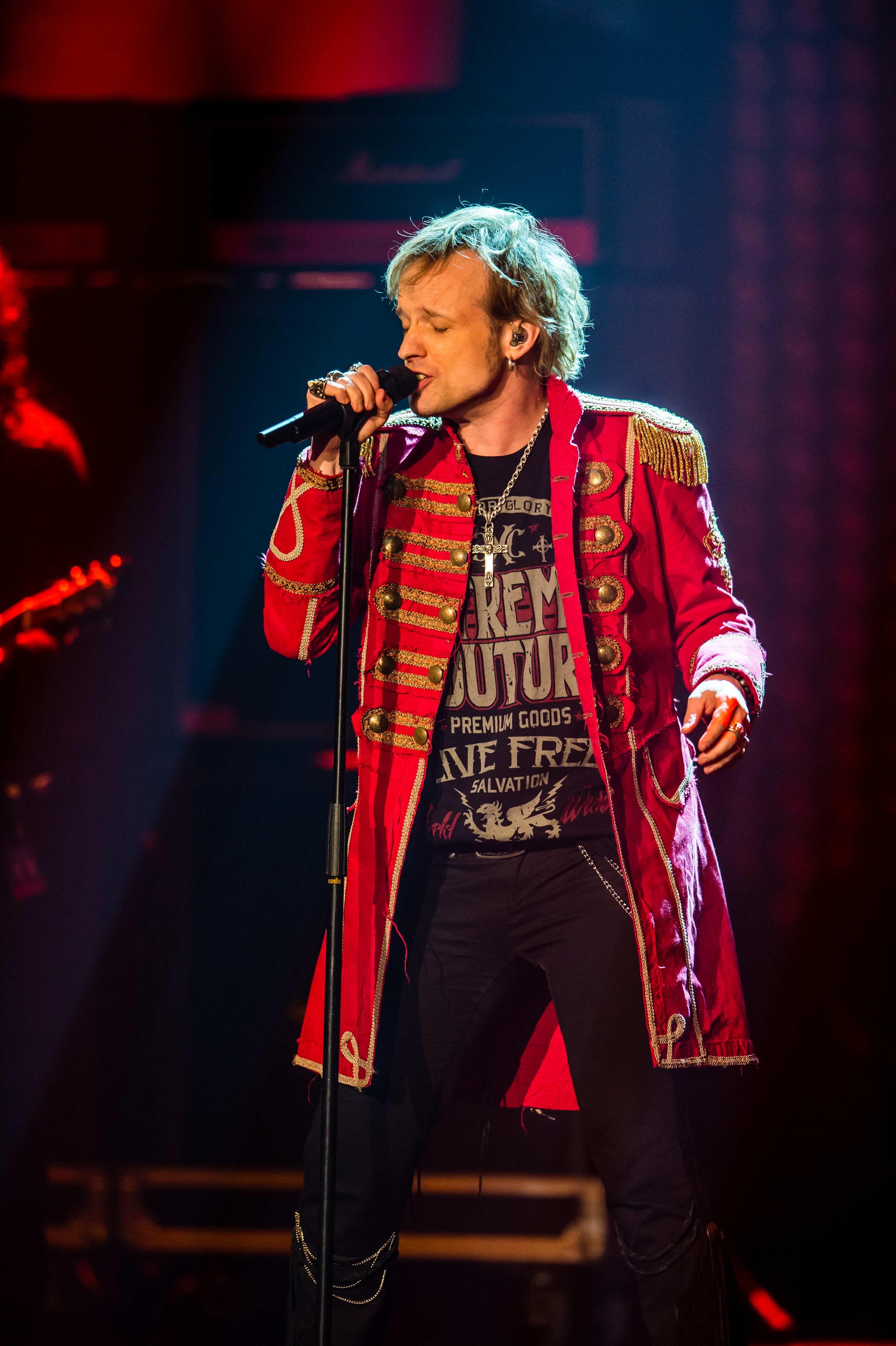 Eurovision Song Contest 2016 - Unser Lied für Stockholm - Avantasia